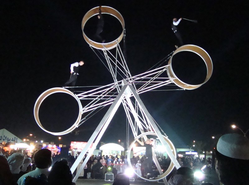 Ein ungewöhnliches Todesrad mit vier Kesseln statt zwei.